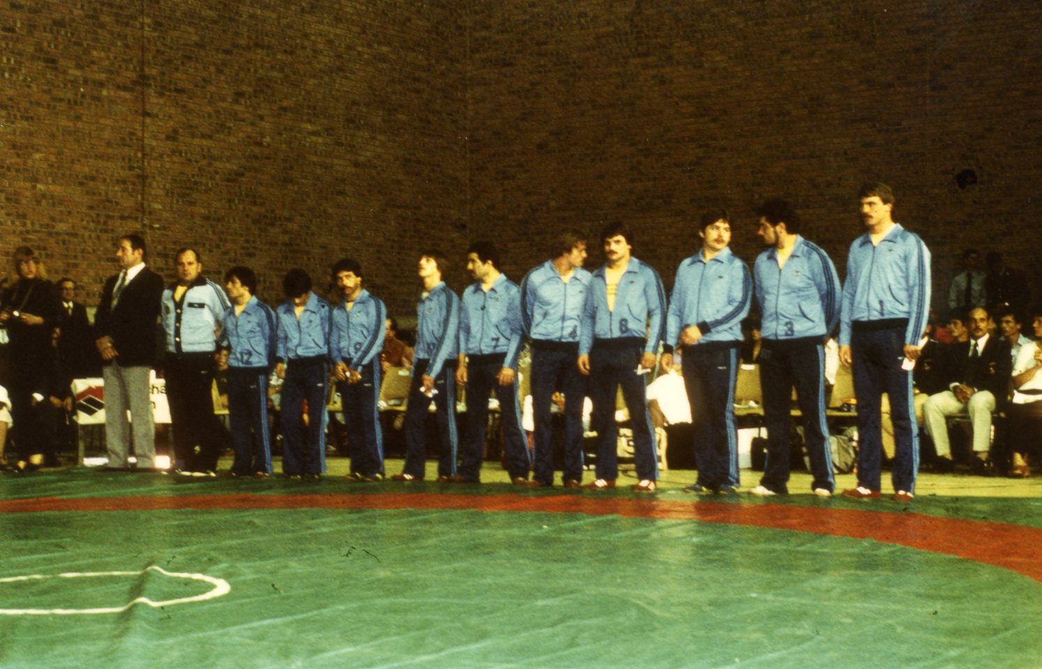 Wilfried Dietrich (erster von links), Gerhard Sattel (fünfter von rechts) - Ringerauswahl Südafrika 1981